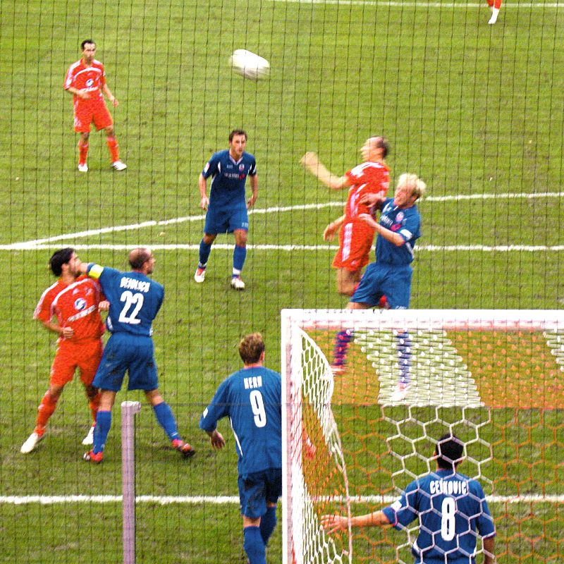 Spielszene aus dem Spiel 1. FC Köln - F.C. Hansa Rostock, 2. Fussball-Bundesliga, 29. Oktober 2006; Endstand 2:2